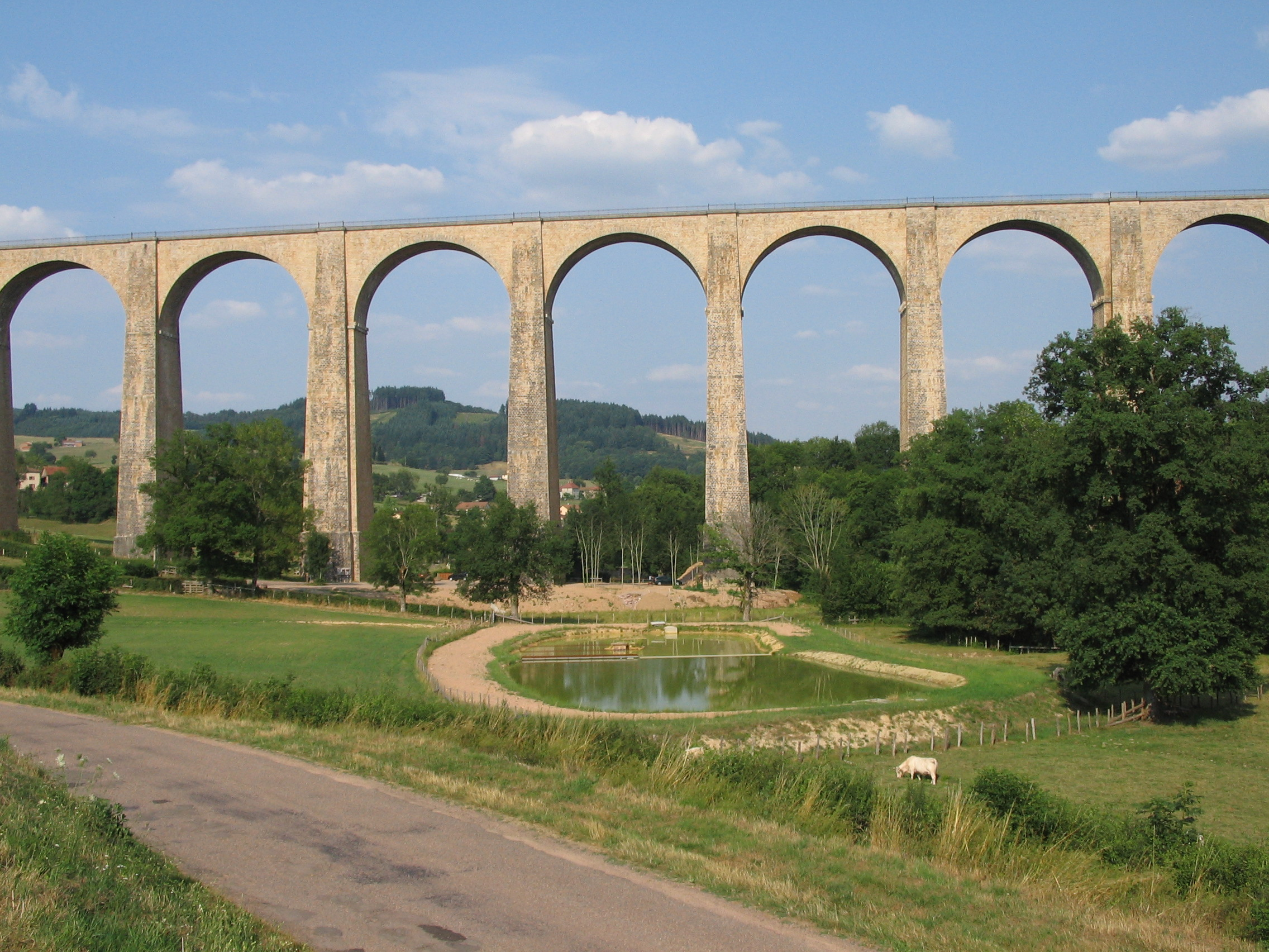 Viaduc de Mussy s/s Dun - 71; en venant de la D985 ("Route buissonnière").